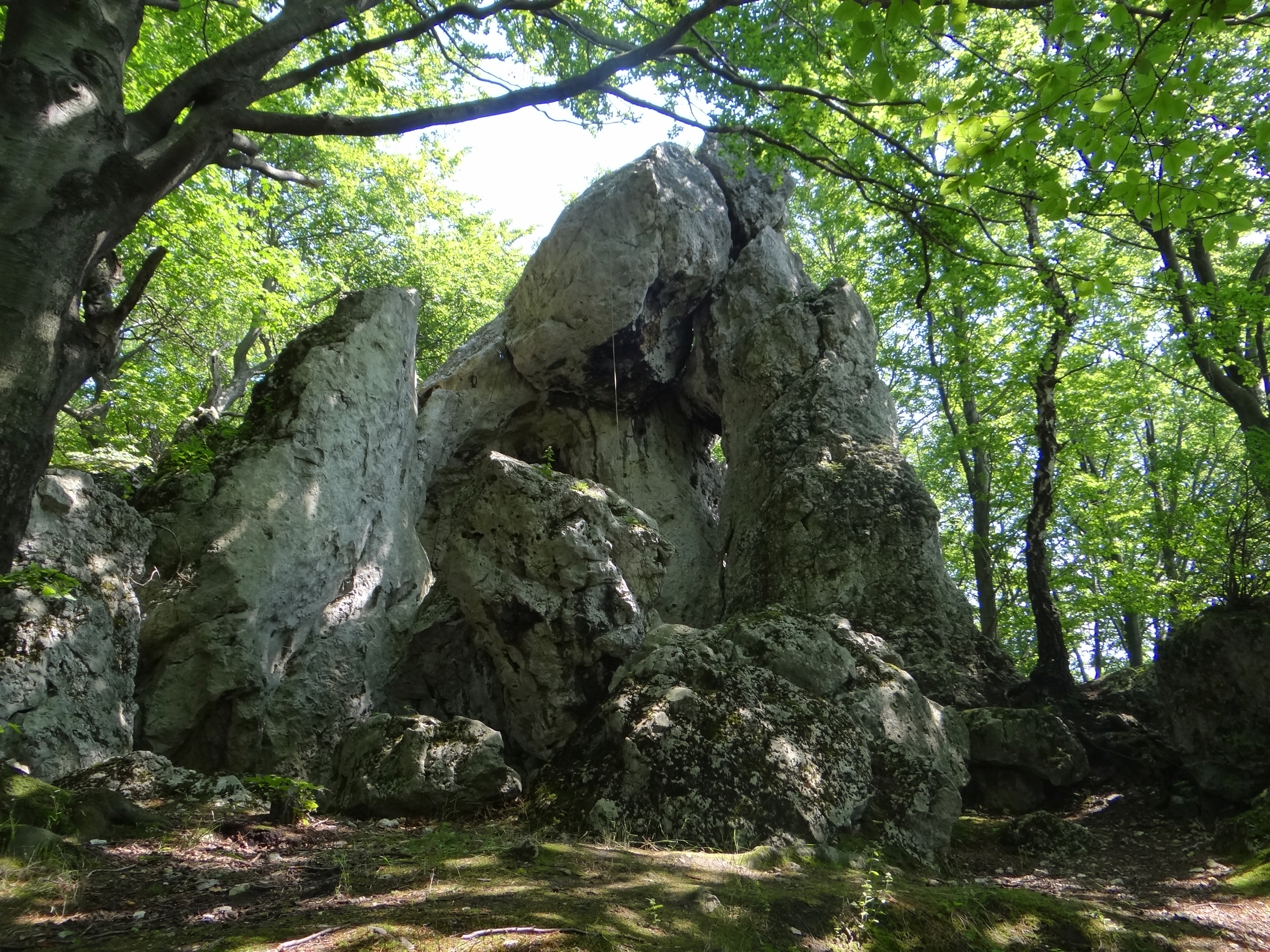 Czarny Kamień w Łutowcu